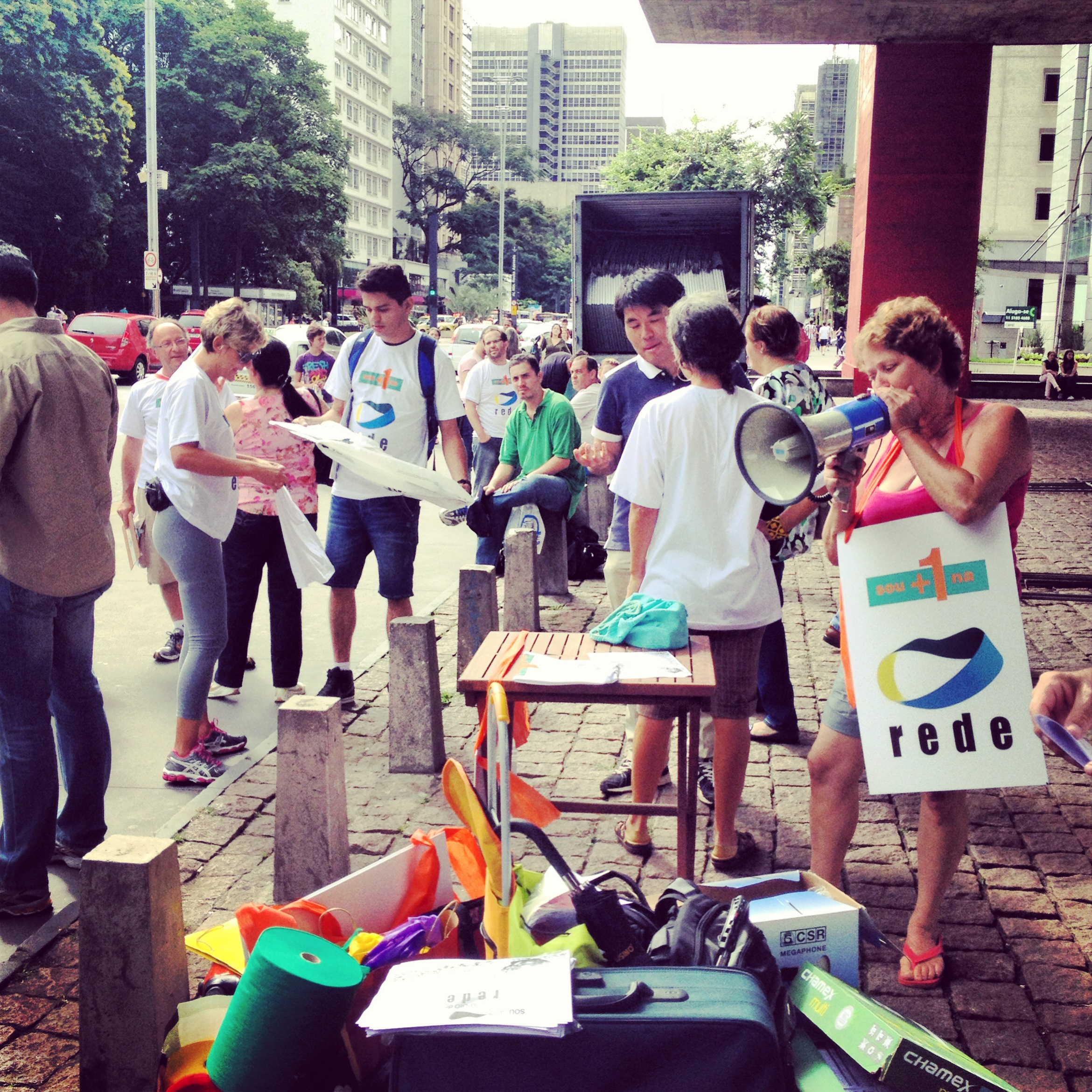 Simpatizantes da Rede Sustentabilidade fazem mutirão de assinaturas para oficialização como partido político.